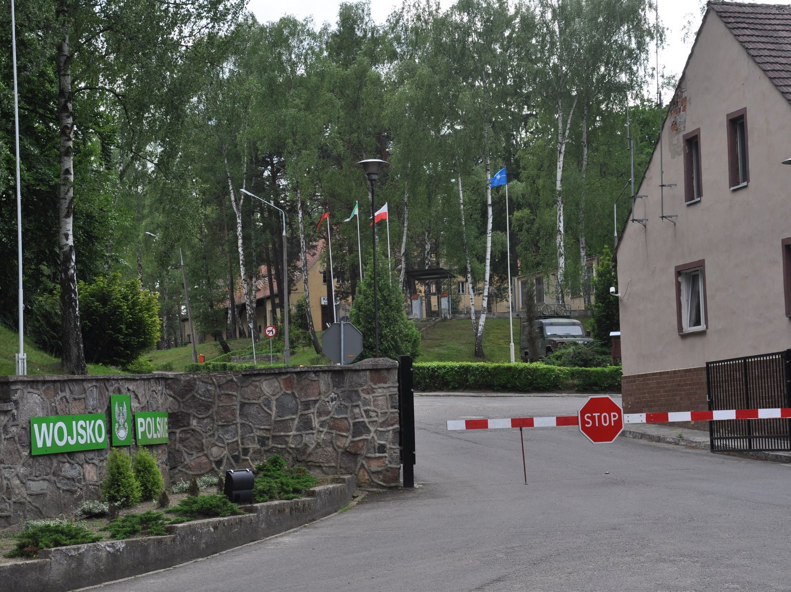 Wędrzyn koszary